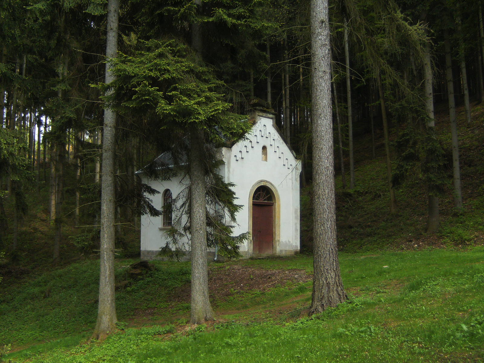 Kapel bij Mariabron van voormalig kuuroord in de heuvels bij het dorp Bila Tremesna in Tsjechie Nu hotel Pod Zvicinou.